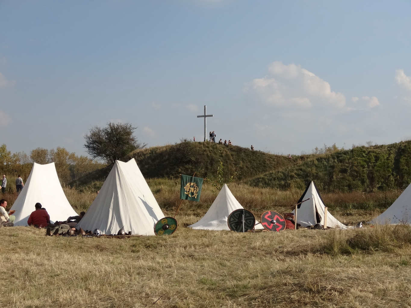 Miasteczko rycerskie przed inscenizacją historyczną na terenie grodziska Wyszogród w Bydgoszczy. „Wyszogród – zanim powstała Bydgoszcz”. III edycja. Bitwa o Wyszogród 1113 r. wg Kroniki Galla Anonima